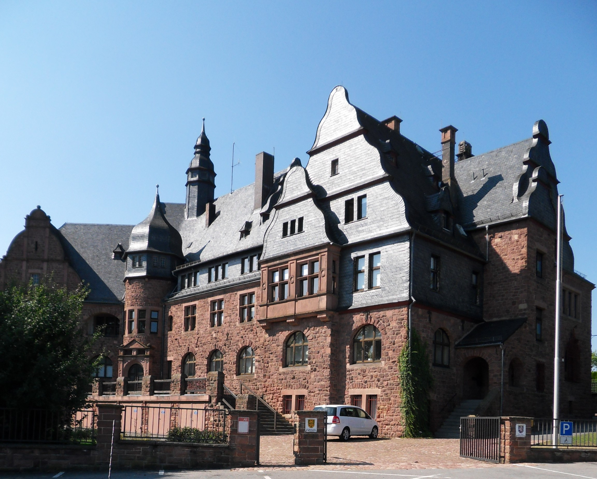 Landratsamt, denkmalgeschütztes Verwaltungsgebäude Michelstädter Straße 12 in Erbach (Odenwald). Erläuterungstafel der Museumsstraße Bergstraße-Odenwald: Das Verwaltungsgebäude wurde 1902-1904 vom Wormser Stadtbaumeister und späterem Professor der Technischen Hochschule Darmstadt, Karl Christian Hofmann (1856-1933), im Renaissancestil entworfen und vom Bauunternehmer und Steinmetz Adam Hild aus Hetzbach errichtet.